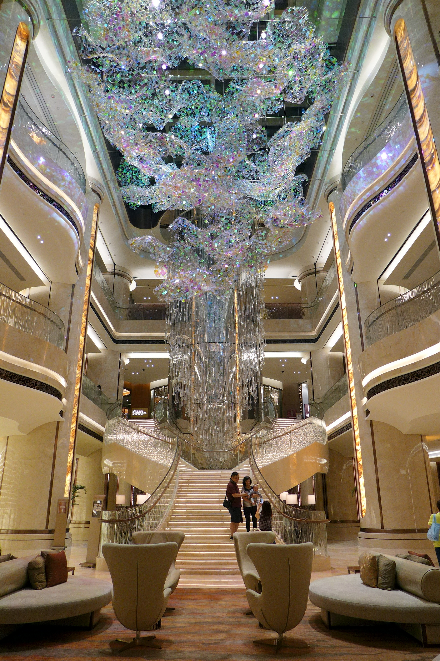 JW Marriott Hotel Lobby